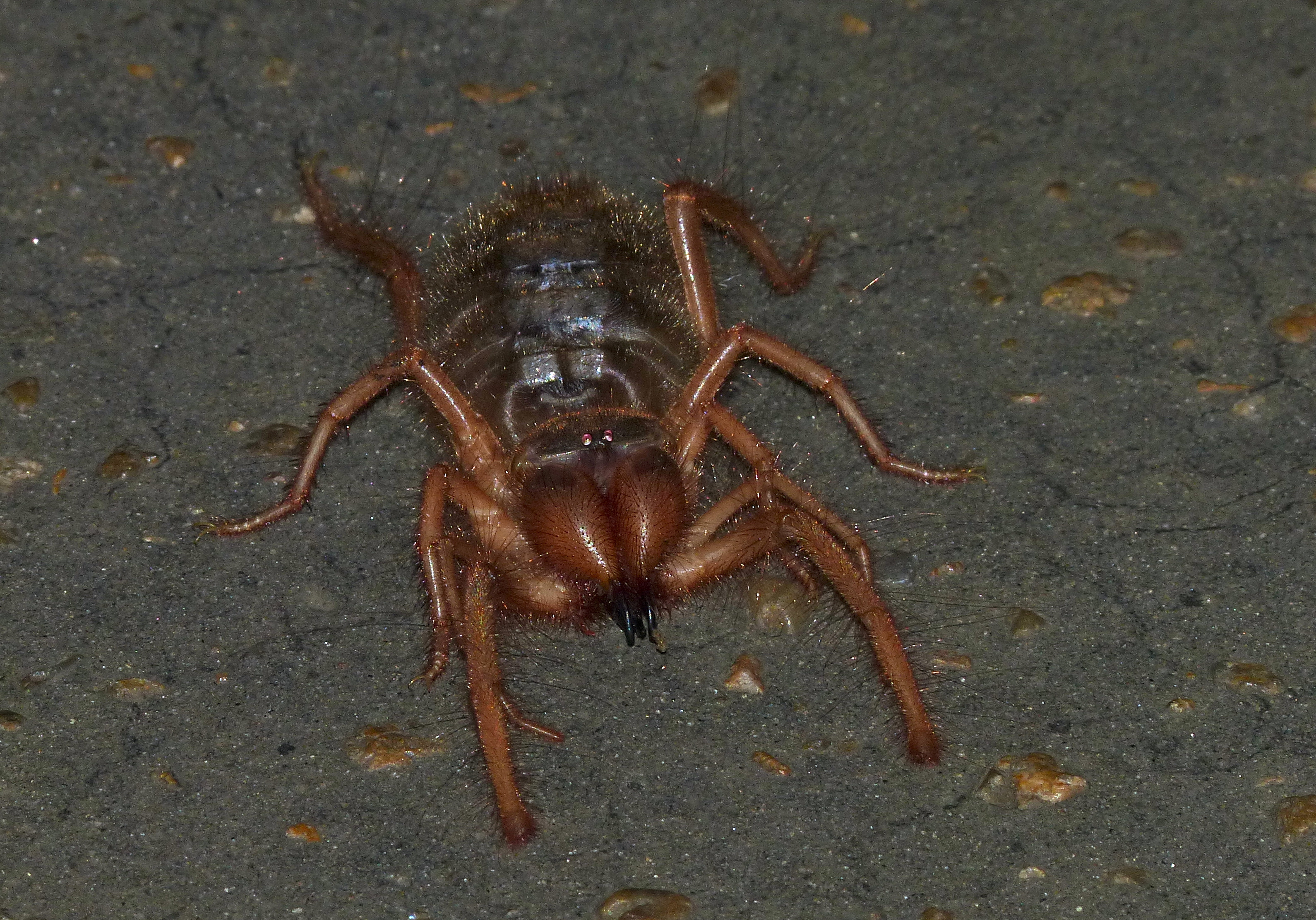 Mopani Camp, Kruger NP, SOUTH AFRICA